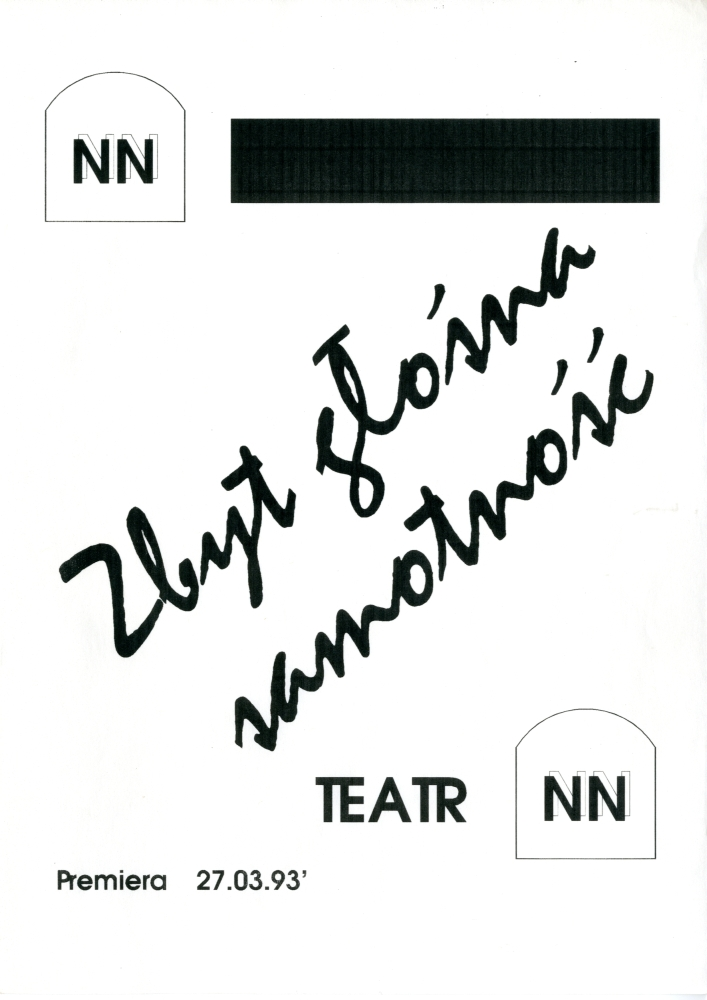 Ulotka dotycząca premiery spektaklu "Zbyt głośna samotność" (Teatr NN)